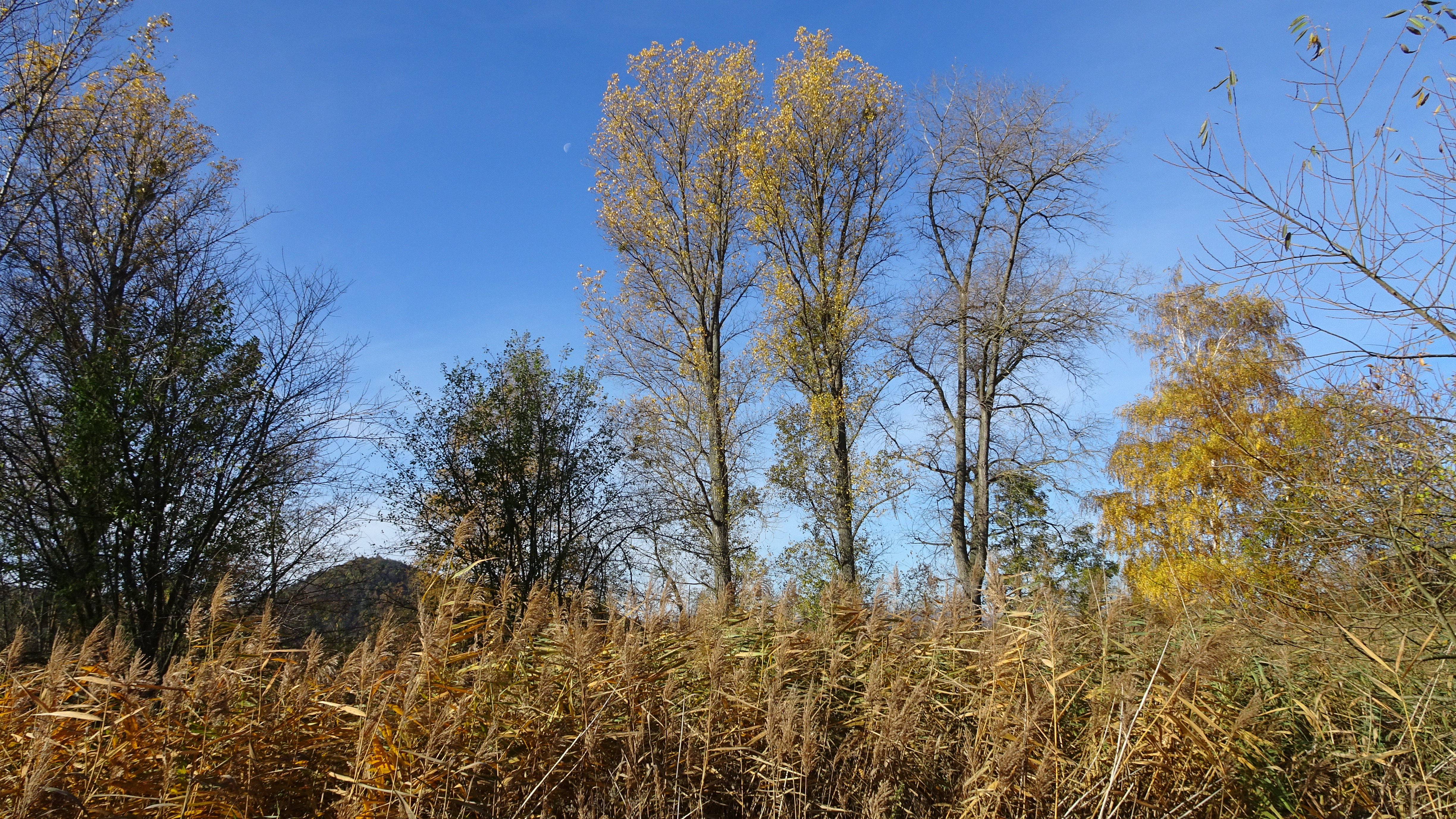 Der östliche Teil des Altarms. Der „Werra-Altarm bei Schwebda“ liegt am südlichen Dorfende von Schwebda, einem Ortsteil der Gemeinde Meinhard im nordhessischen Werra-Meißner-Kreis. Die ehemalige Flussschleife im Eschweger Becken wurde im 19. Jahrhundert durch eine künstliche Begradigung der Werra vom Hauptstrom abgetrennt. Um den, zum Lebensraum von einer Vielzahl von Vogelarten gewordenen Bereich zu schützen wurde die rund acht Hektar große Fläche zum Naturschutzgebiet und Flora-Fauna-Habitat-Gebiet erklärt.